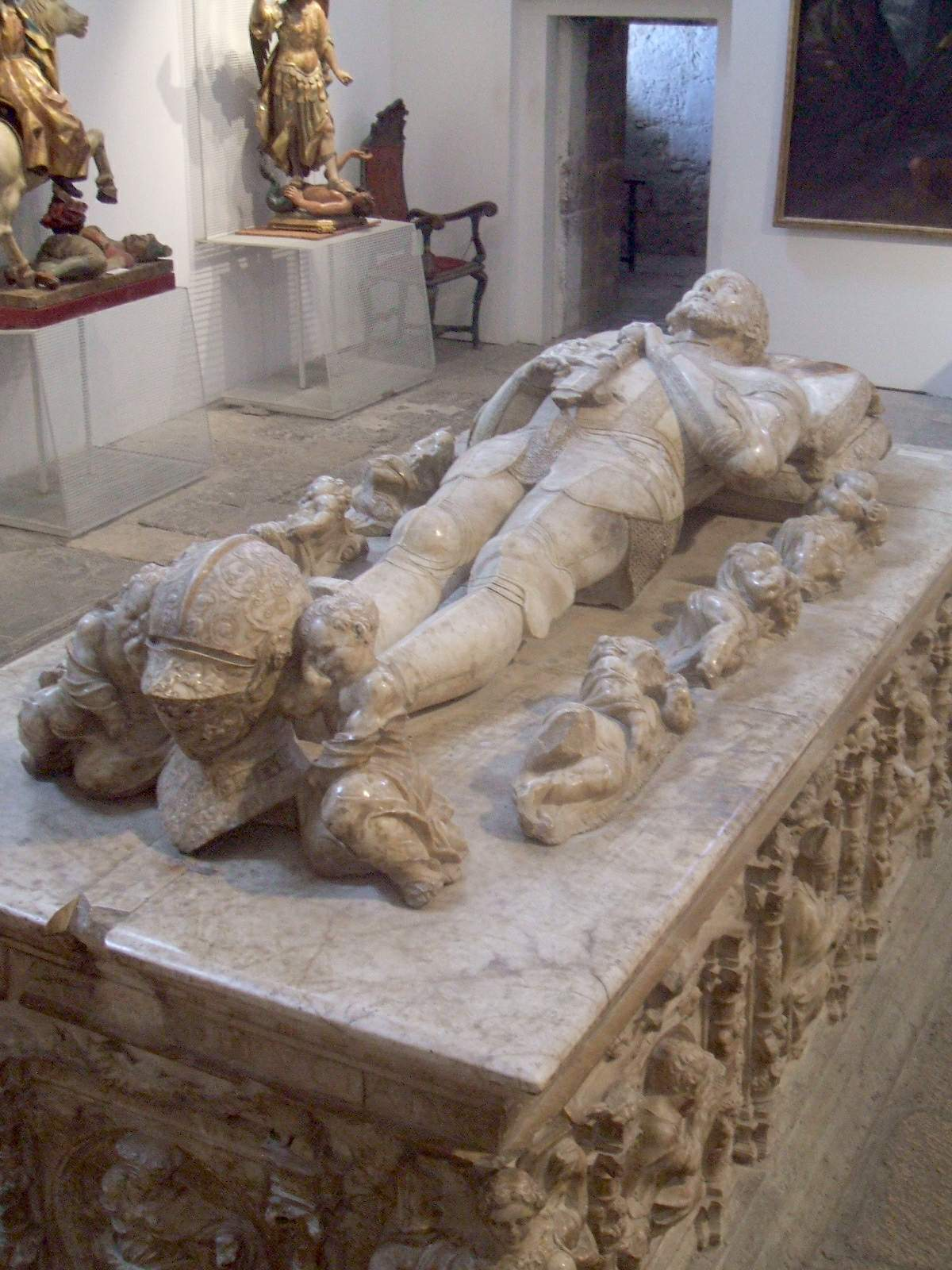 Tordesillas - Iglesia-Museo de San Antolín